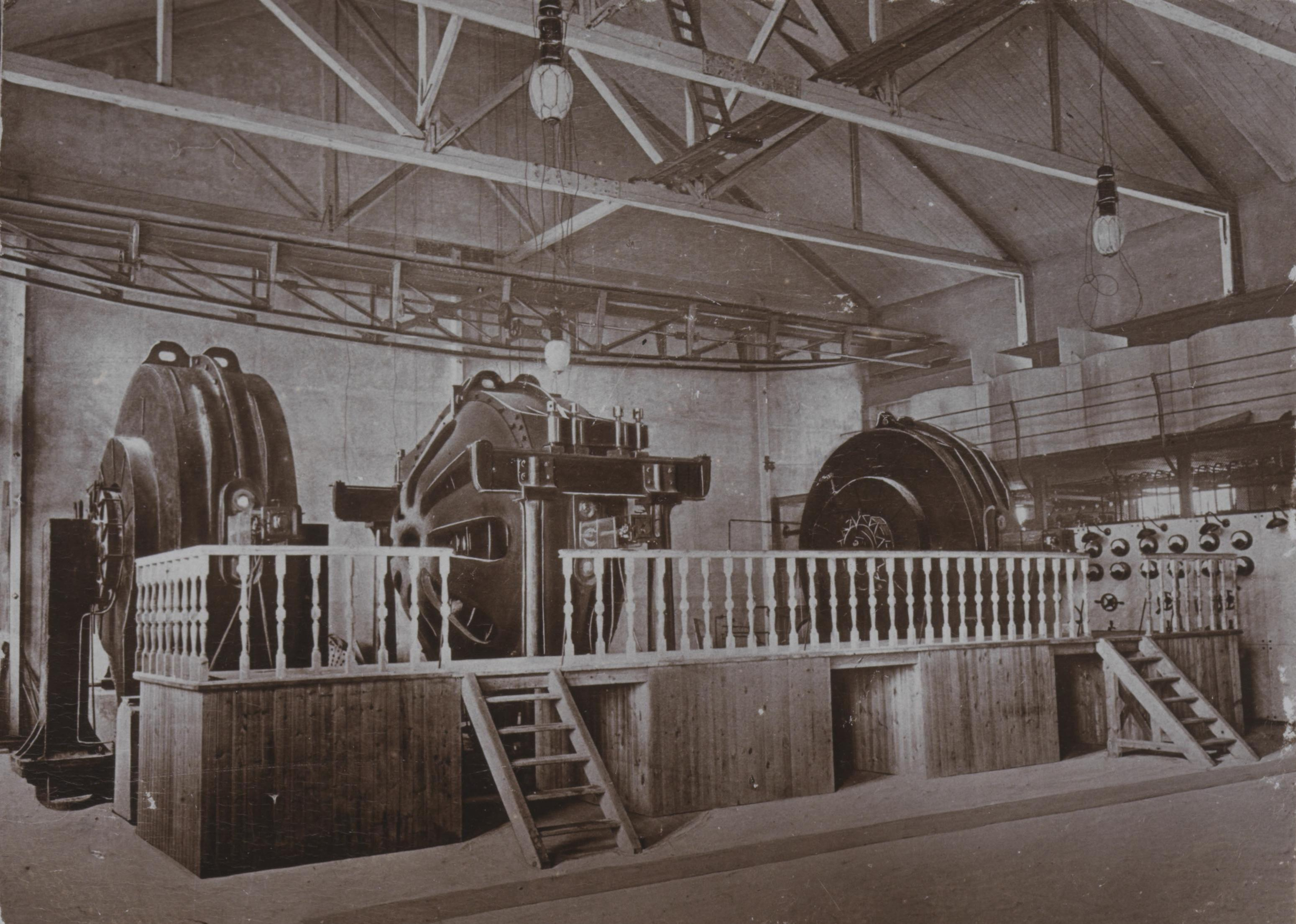 Bildet er hentet fra Nasjonalbibliotekets bildesamling Notodden, Telemark